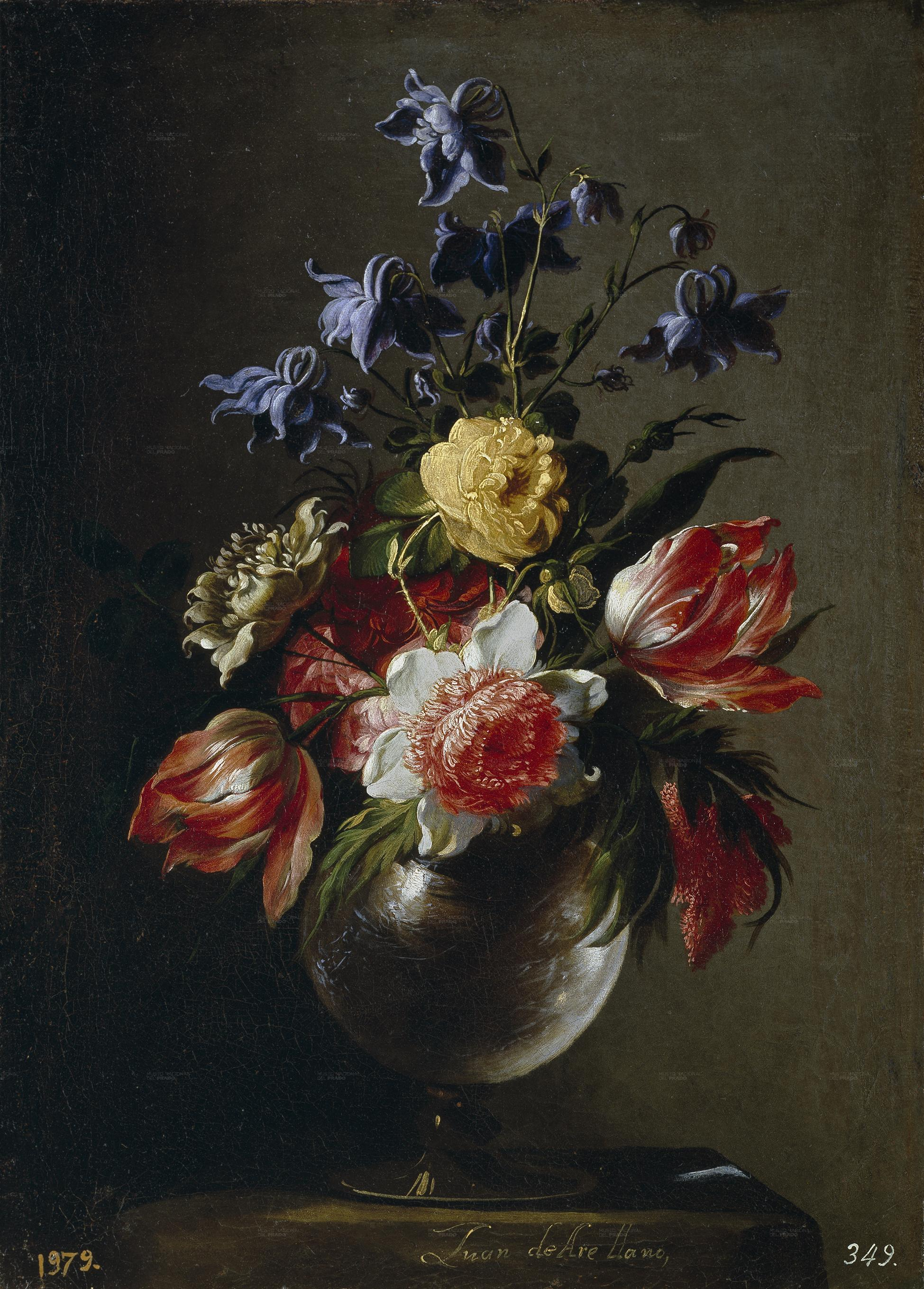 Florerolabel QS:Les,"Florero"